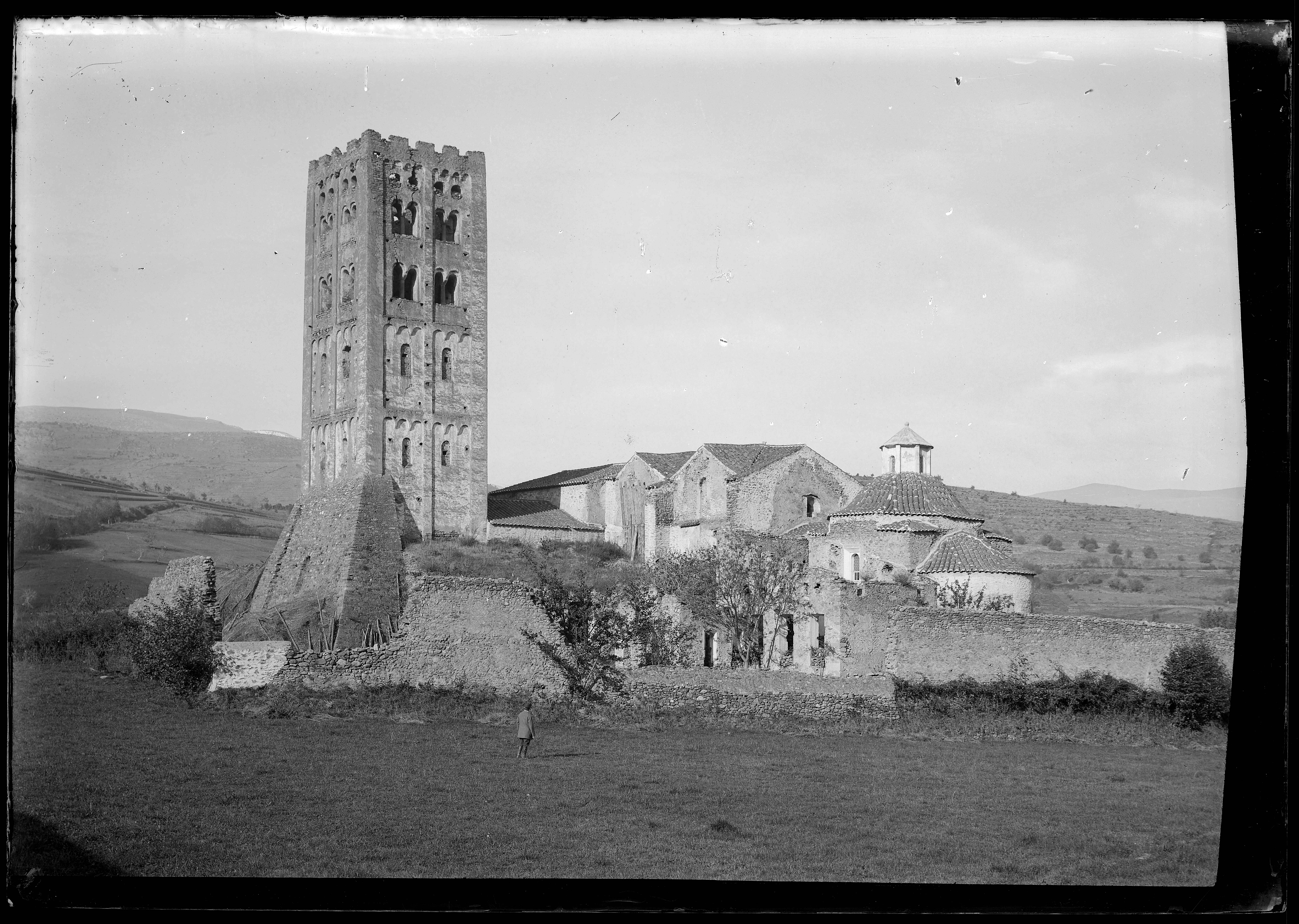 plaque négative au gélatino bromure d'argent, format 15x21 cm. Inscription manuscrite par Eugène Trutat sur l'enveloppe : " Abbaye de St Michel Pyr. Or. "